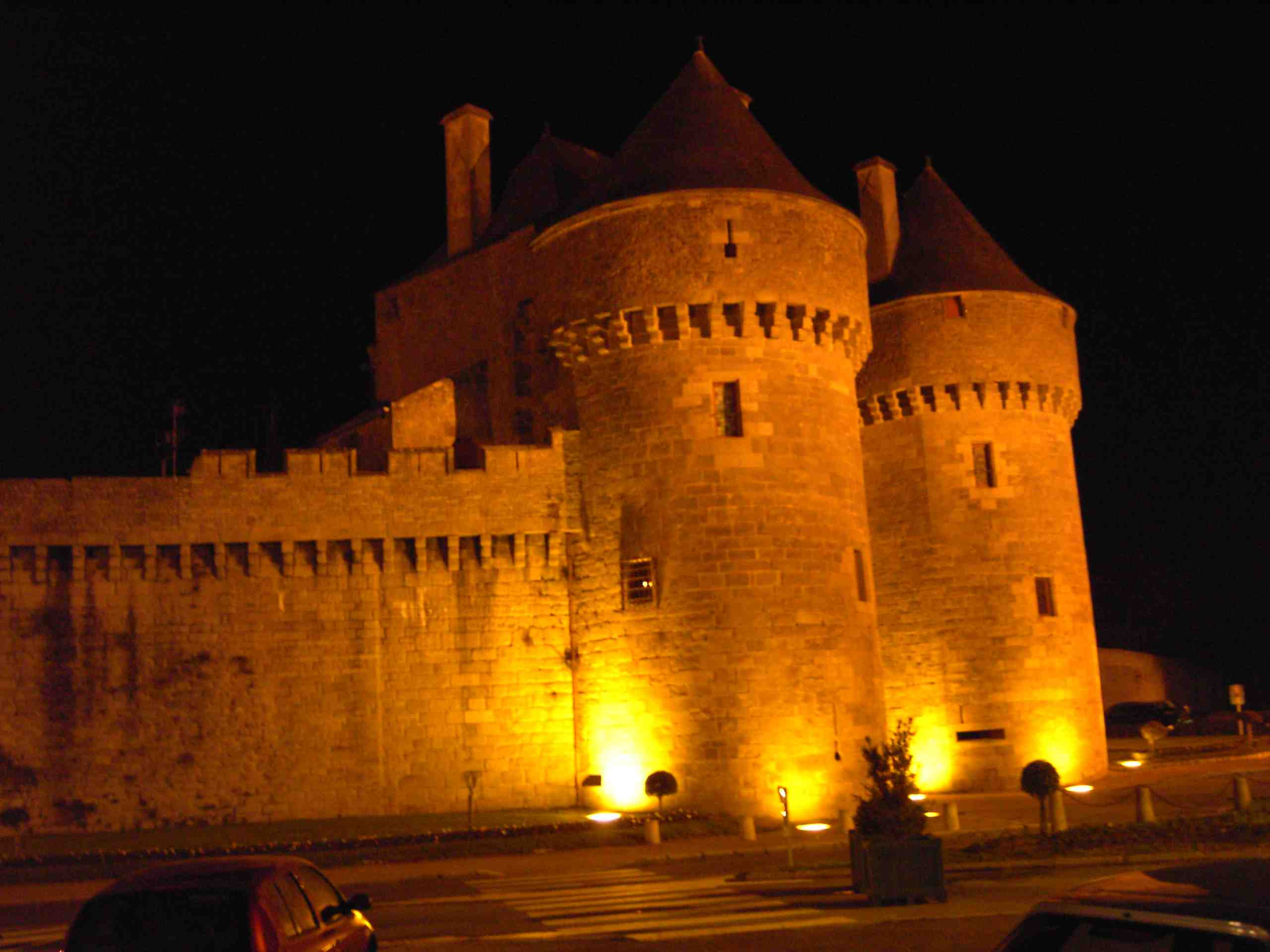 Guérande bei Nacht. Fotograf: Bernd Reichelt. Aufnahme: November 2005